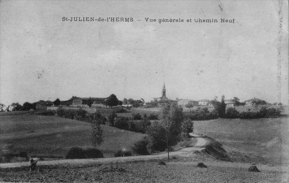 Saint-Julien-de-l'Herms : vue générale et Chemin Neuf. Carte postale ancienne.